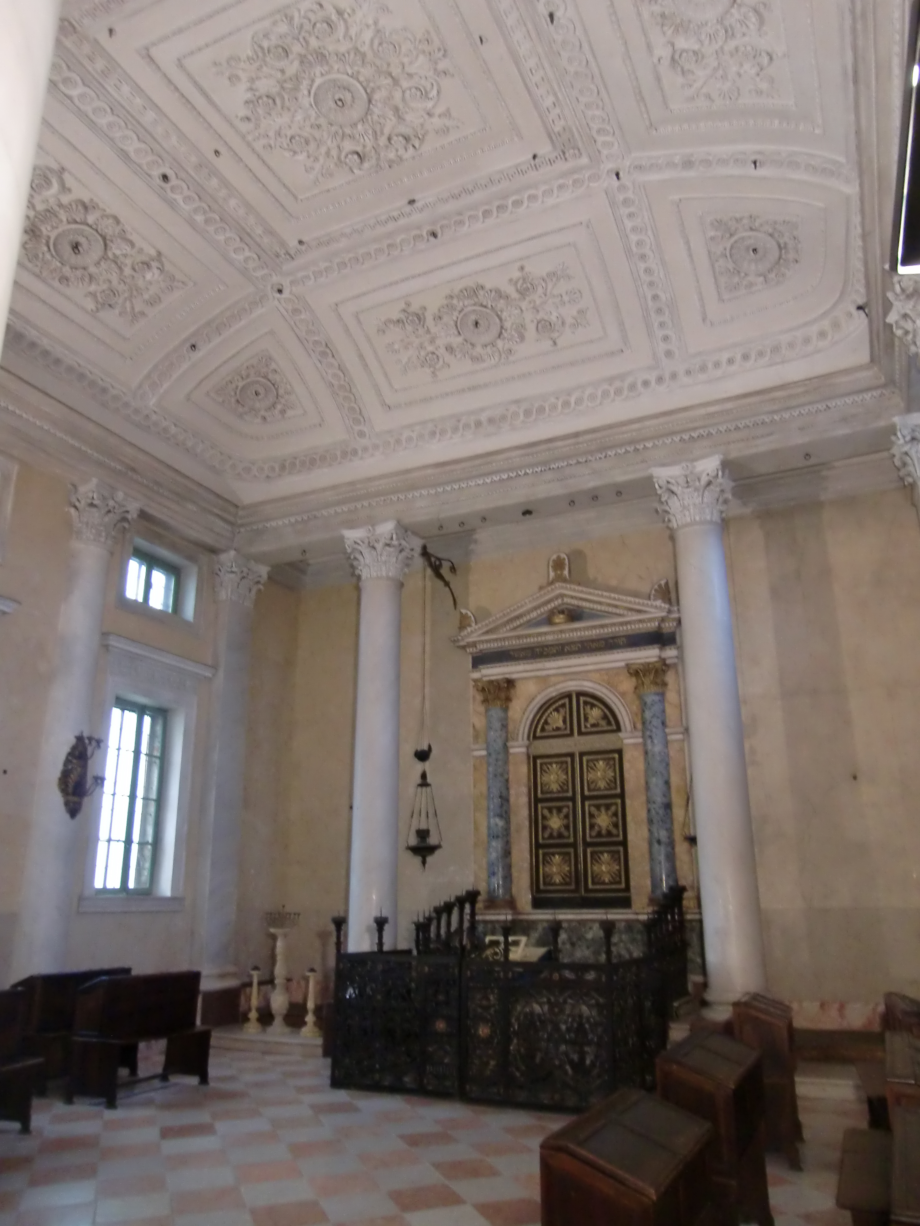 Synagoge Innenraum in Sabbioneta